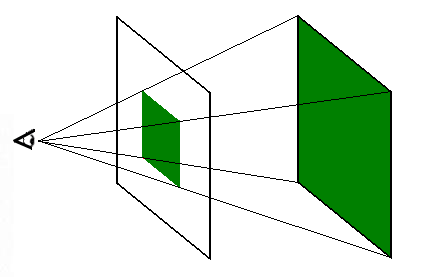 Perspectiva